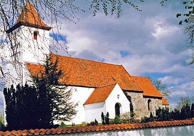 Astrup Kirke, Århus Kommune, Ning Herred, Århus Amt, Denmark